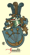 Familienwappen Howaldt